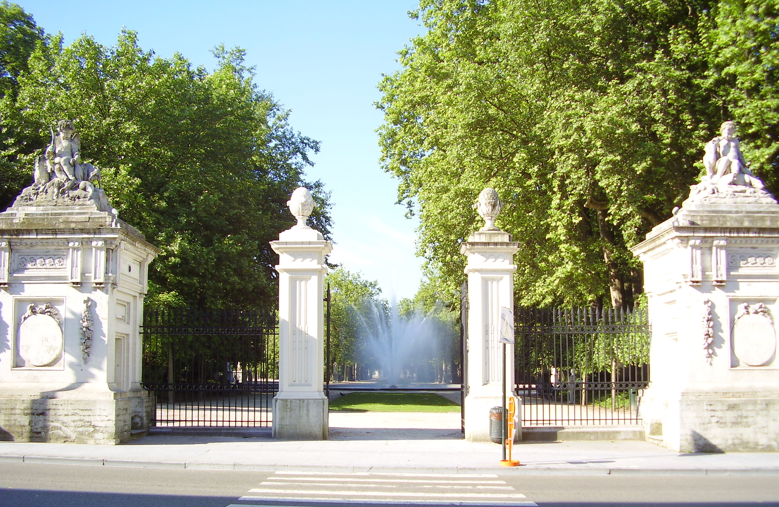 Description: Parc de Bruxelles (Rue de la Loi), Bruxelles Author: User:Ben2 Date of creation: 17 juin 2006 Source: Photo personnelle